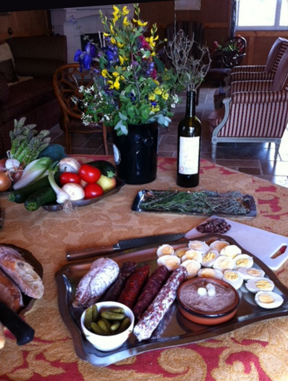 Gastronomie au domaine O'vineyards